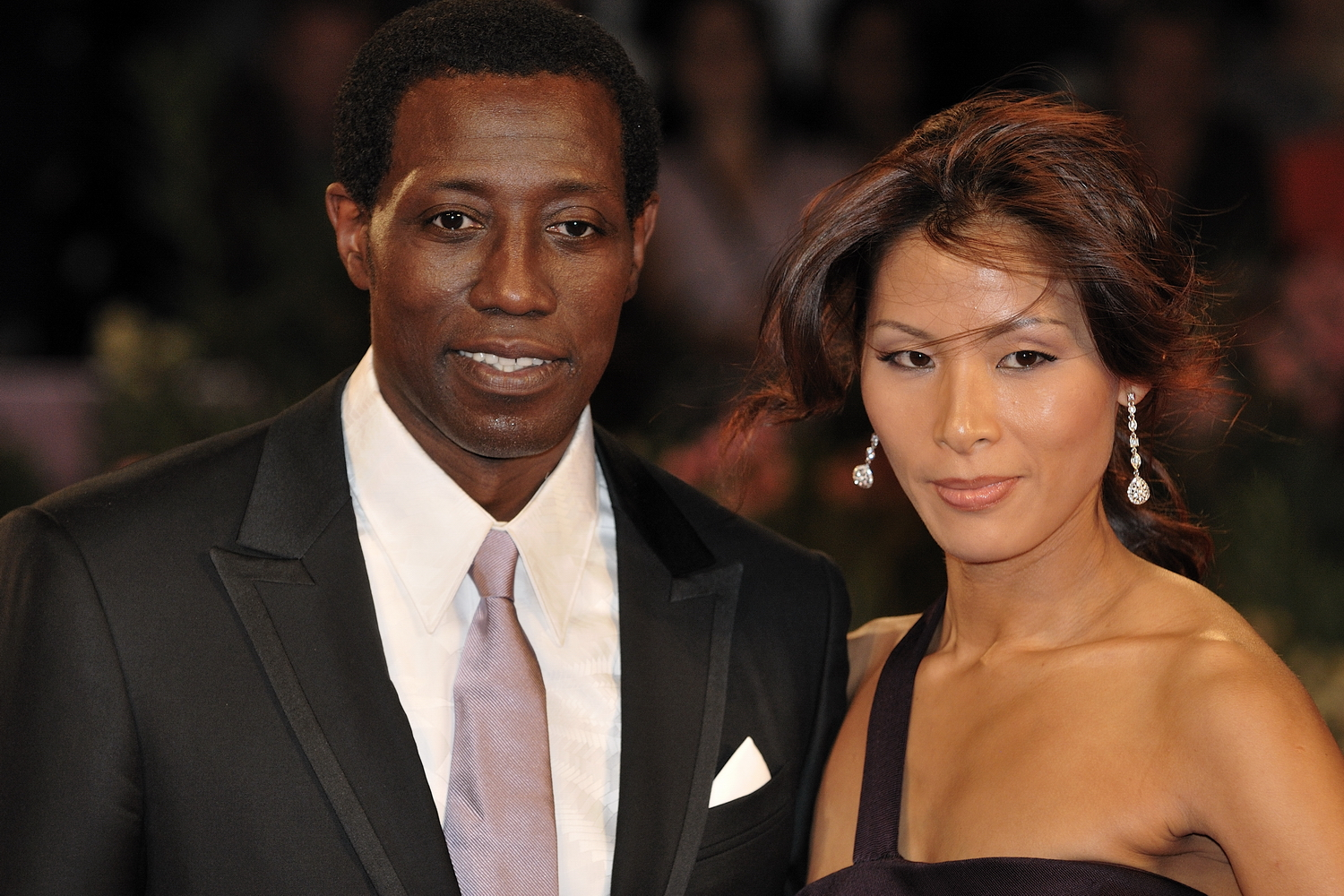 66ème Festival du Cinéma de Venise (Mostra), 8ème jour (07/09/2009) Tapis rouge avec Ethan Hawke et Wesley Snipes et le réalisateur Antoine Fuqua pour le film : Brooklyn's finest